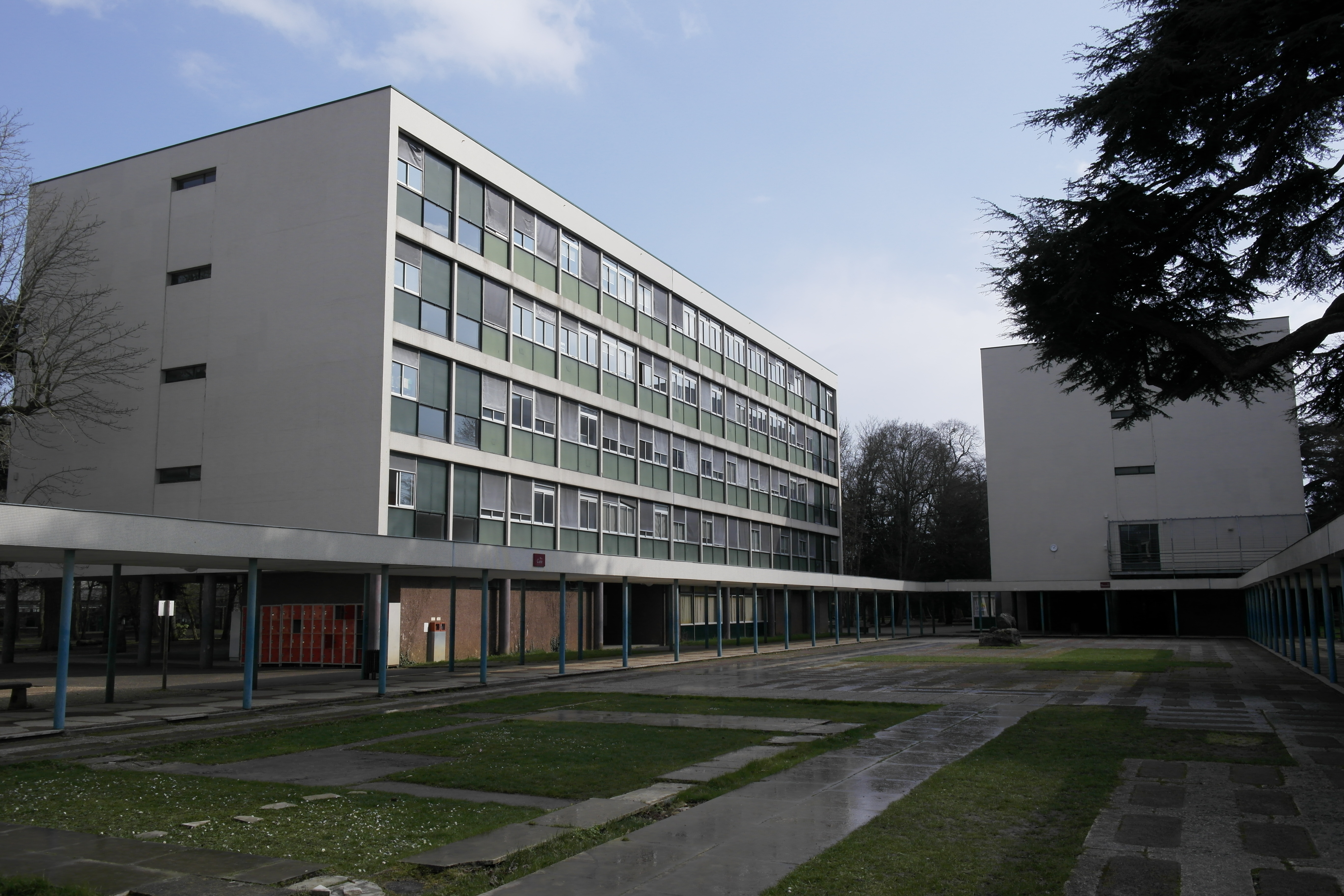 Bâtiments Curie (sciences, à gauche) et Descartes (lettres et maths, à droite)